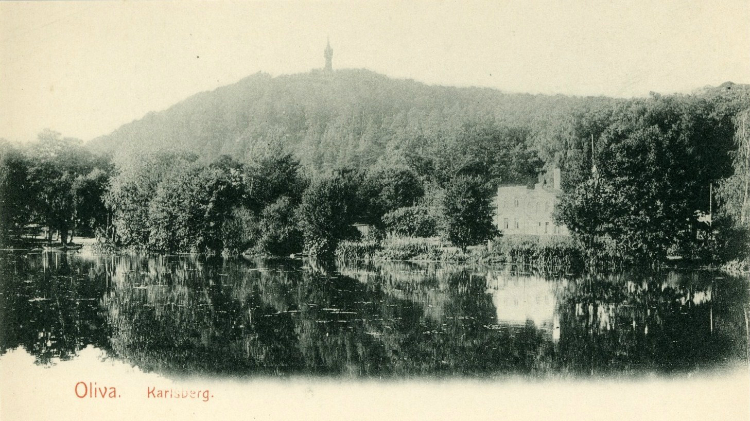 Oliva; Karlsberg